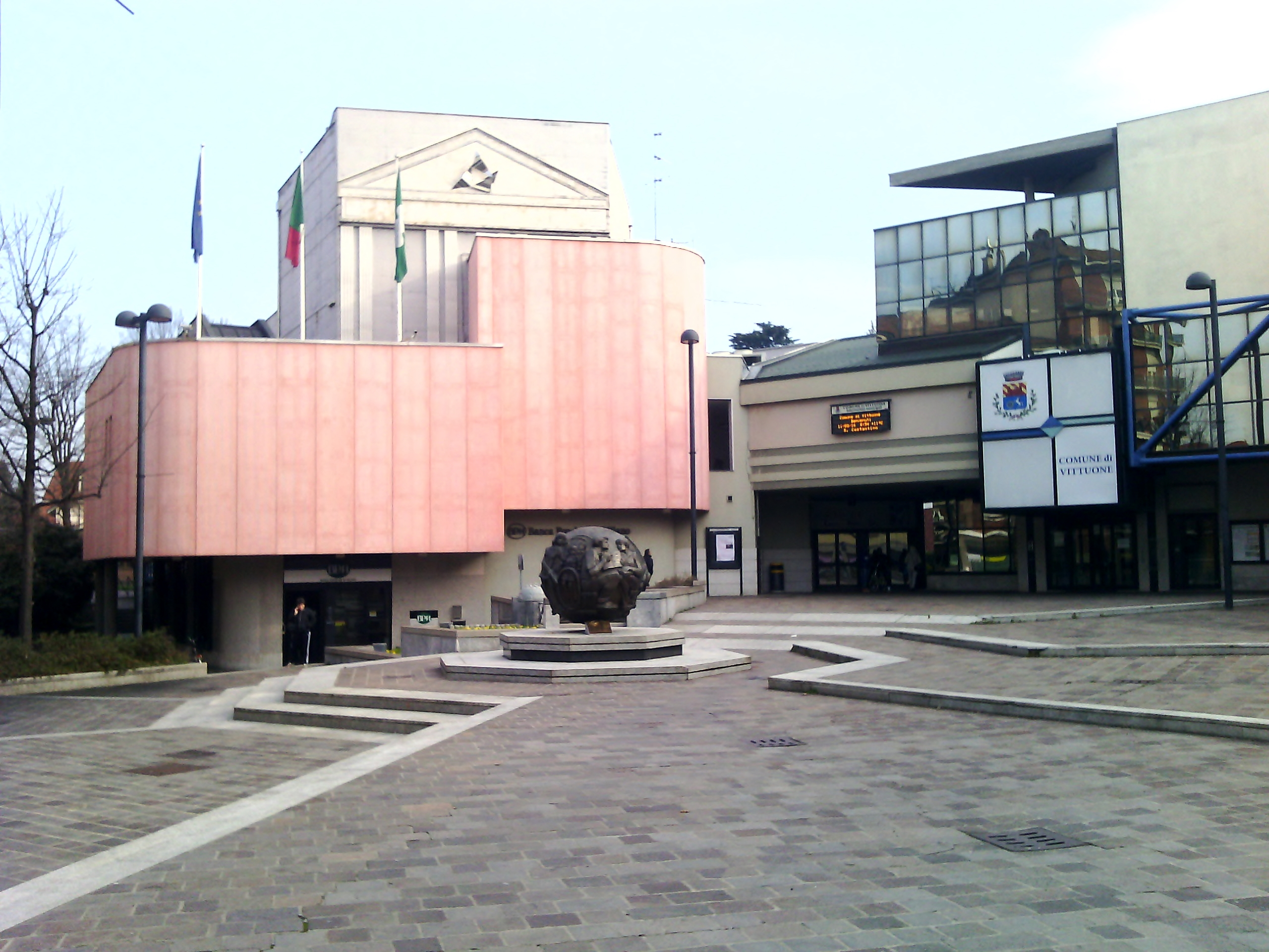 Piazza Italia a Vittuone (MI) - Italy